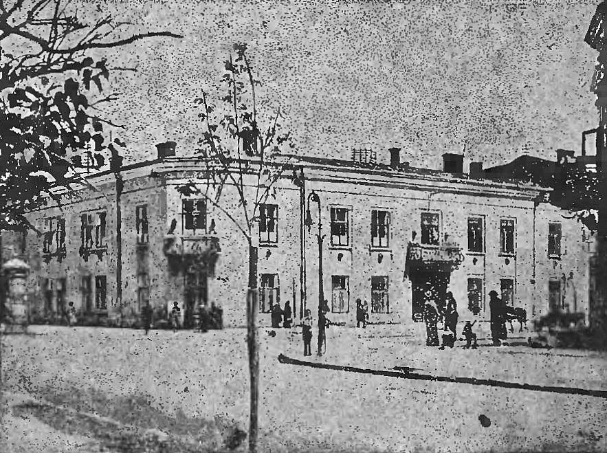 Budynek gimnazjalny przy ul. Andrzeja Potockiego 22 w Stryju (-1931)